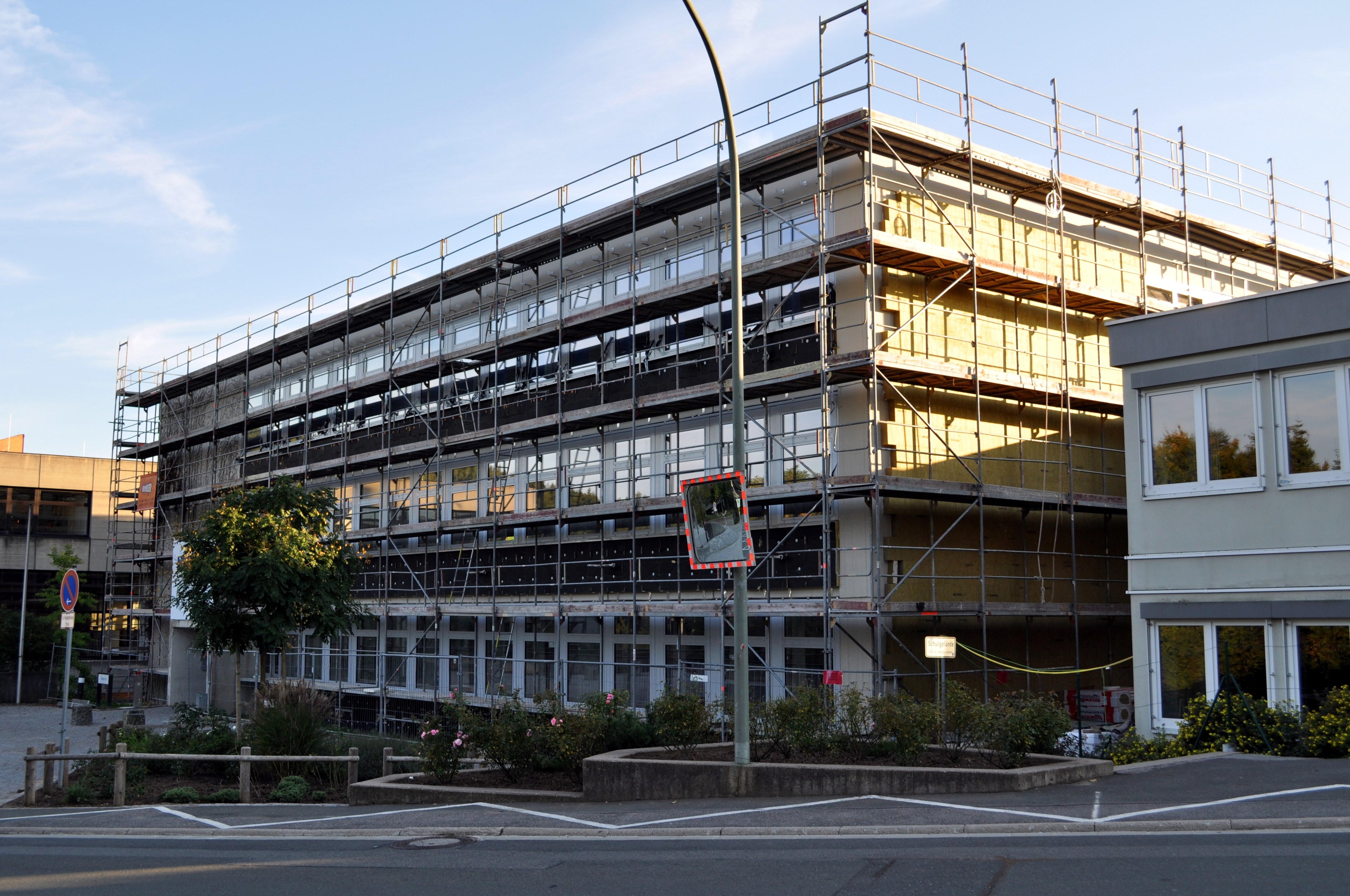 Die Burgkunstadter Realschule während der energetischen Sanierung zwischen 2009- ? (vmtl. Ende 2010)